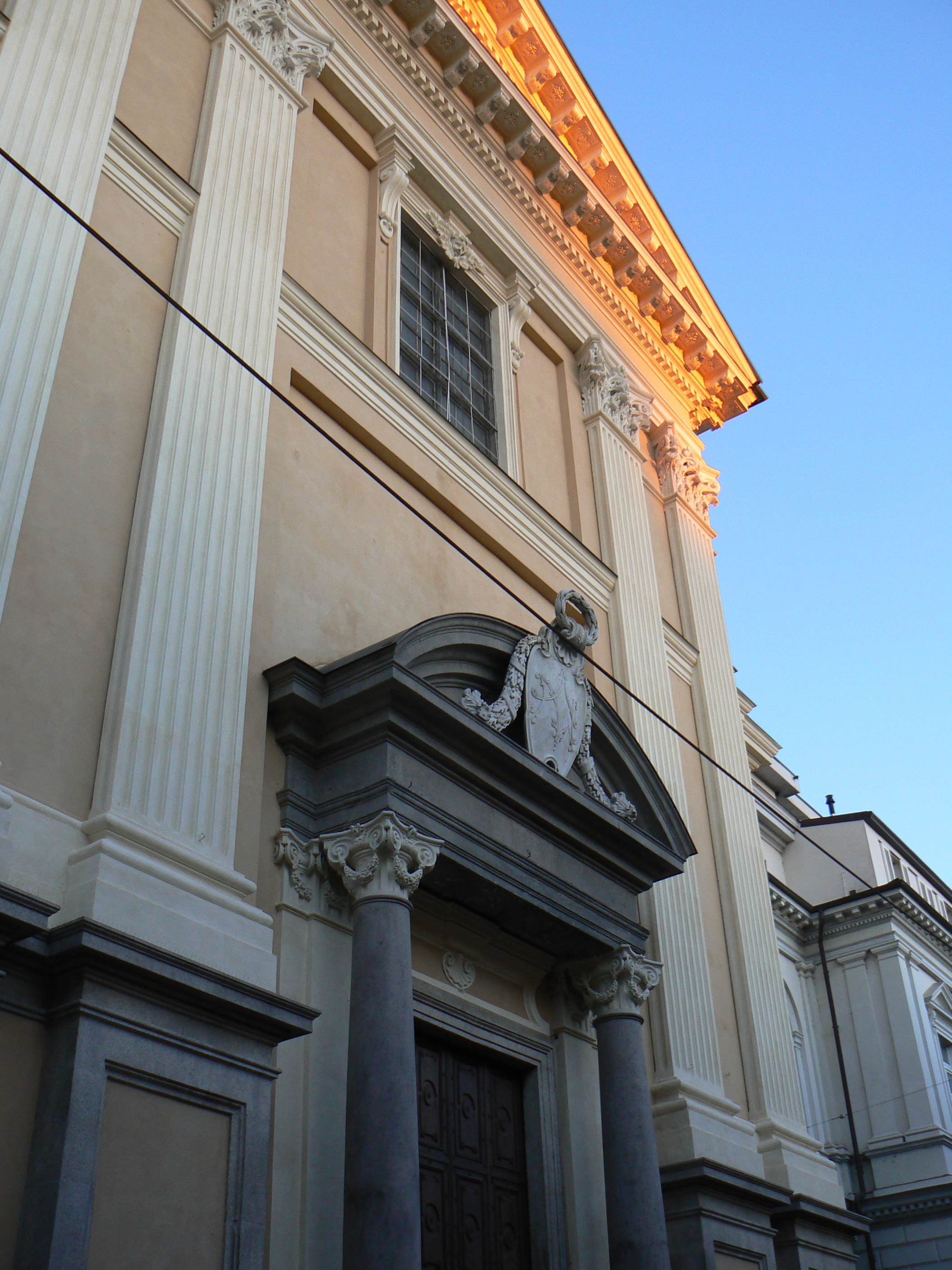 Chiesa di Santa Maria Maggiore (Vercelli)